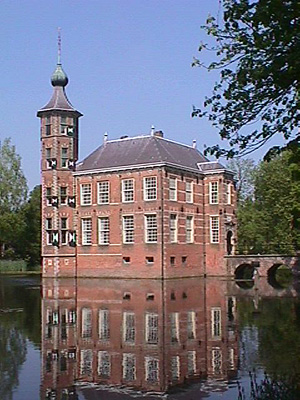 Kasteel Bouvigne ligt in het Mastbos ten het zuiden van Breda.